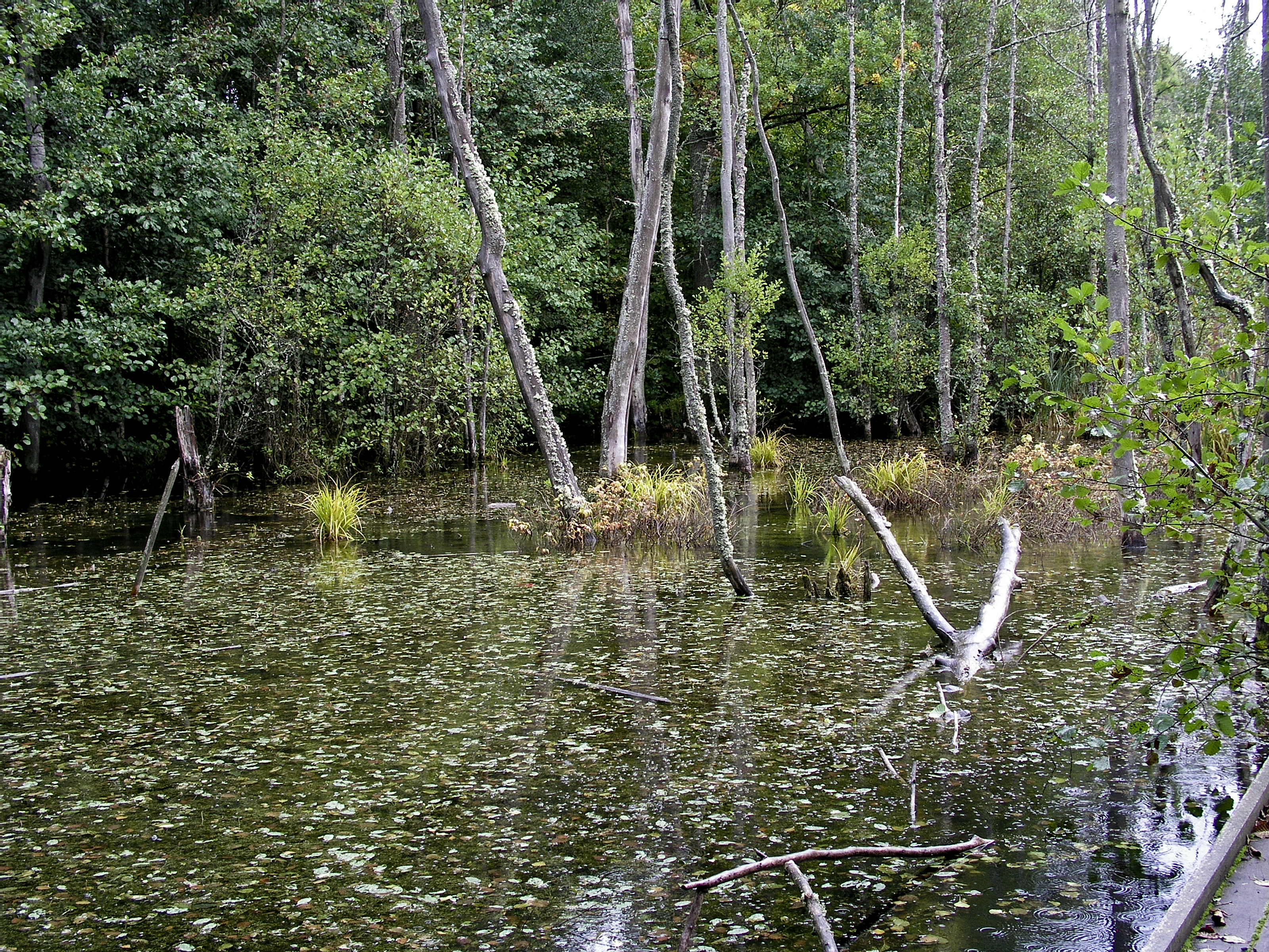 Kärna mosse naturreservat, källdammen. Malmslätt, Linköping, Sverige.